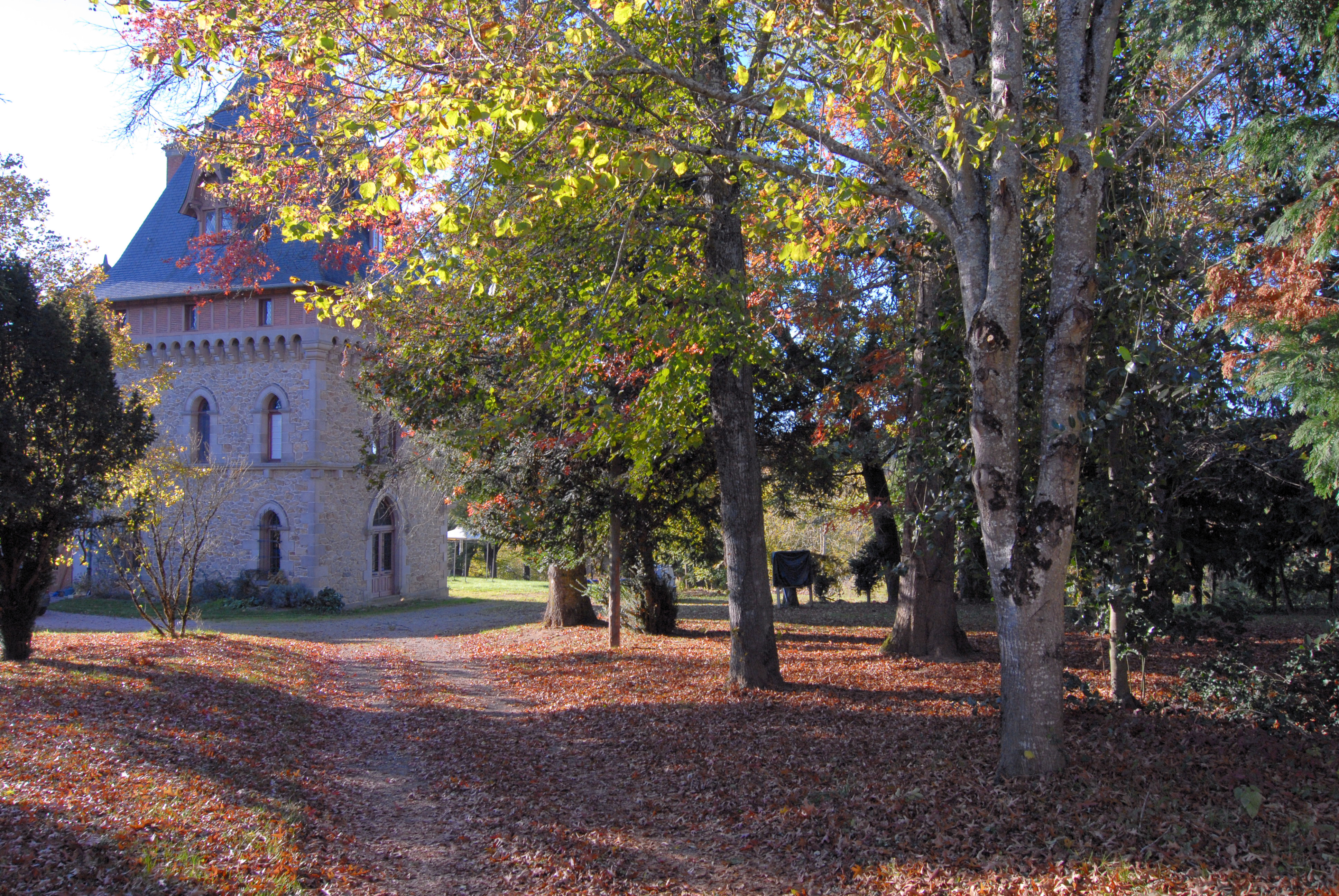 Château de Gigondas Commune d'Isle (Haute Vienne)